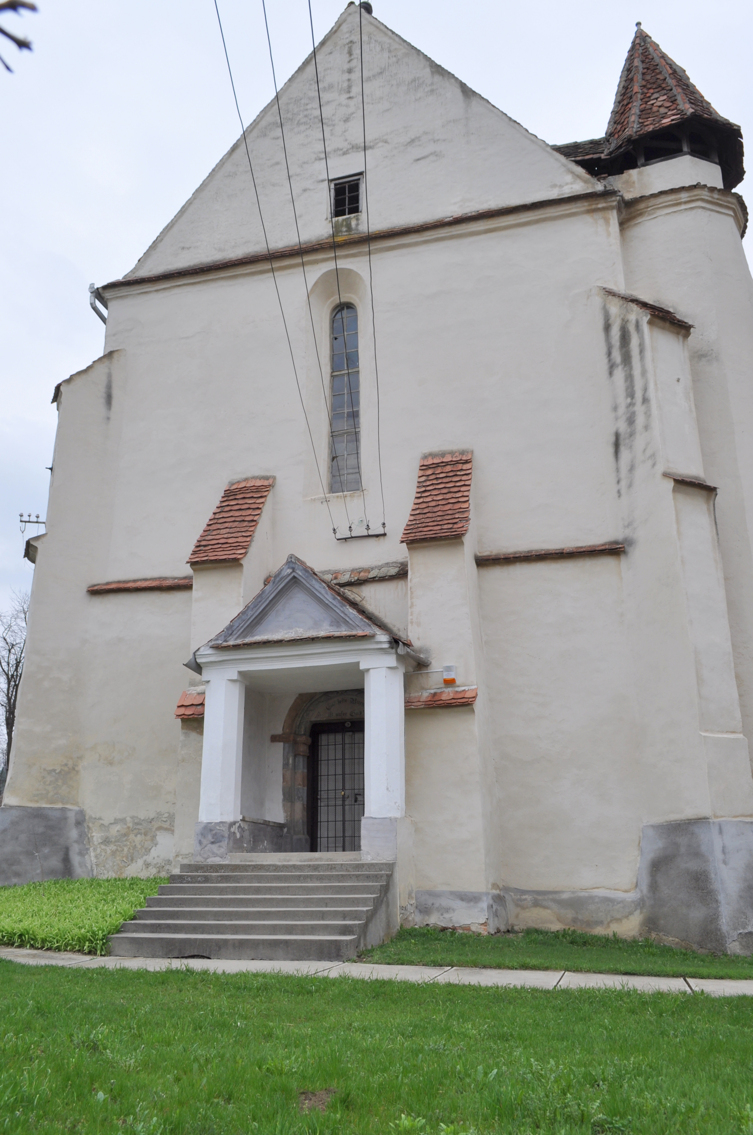 Biserica evanghelică fortificată, sat BAZNA; comuna BAZNA, județul Sibiu 01